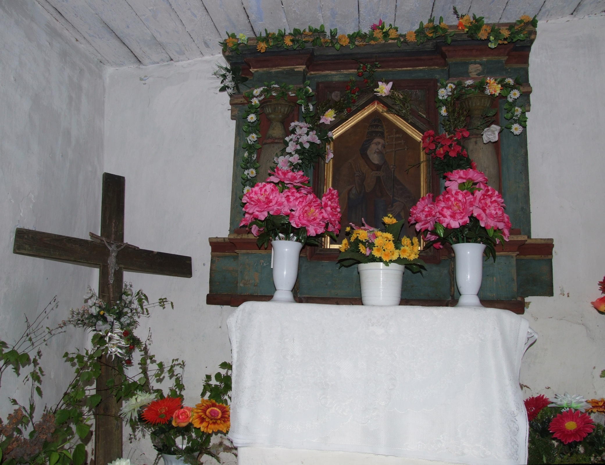 Kaplica św. Urbana na górze Bukowiec w Iwkowej